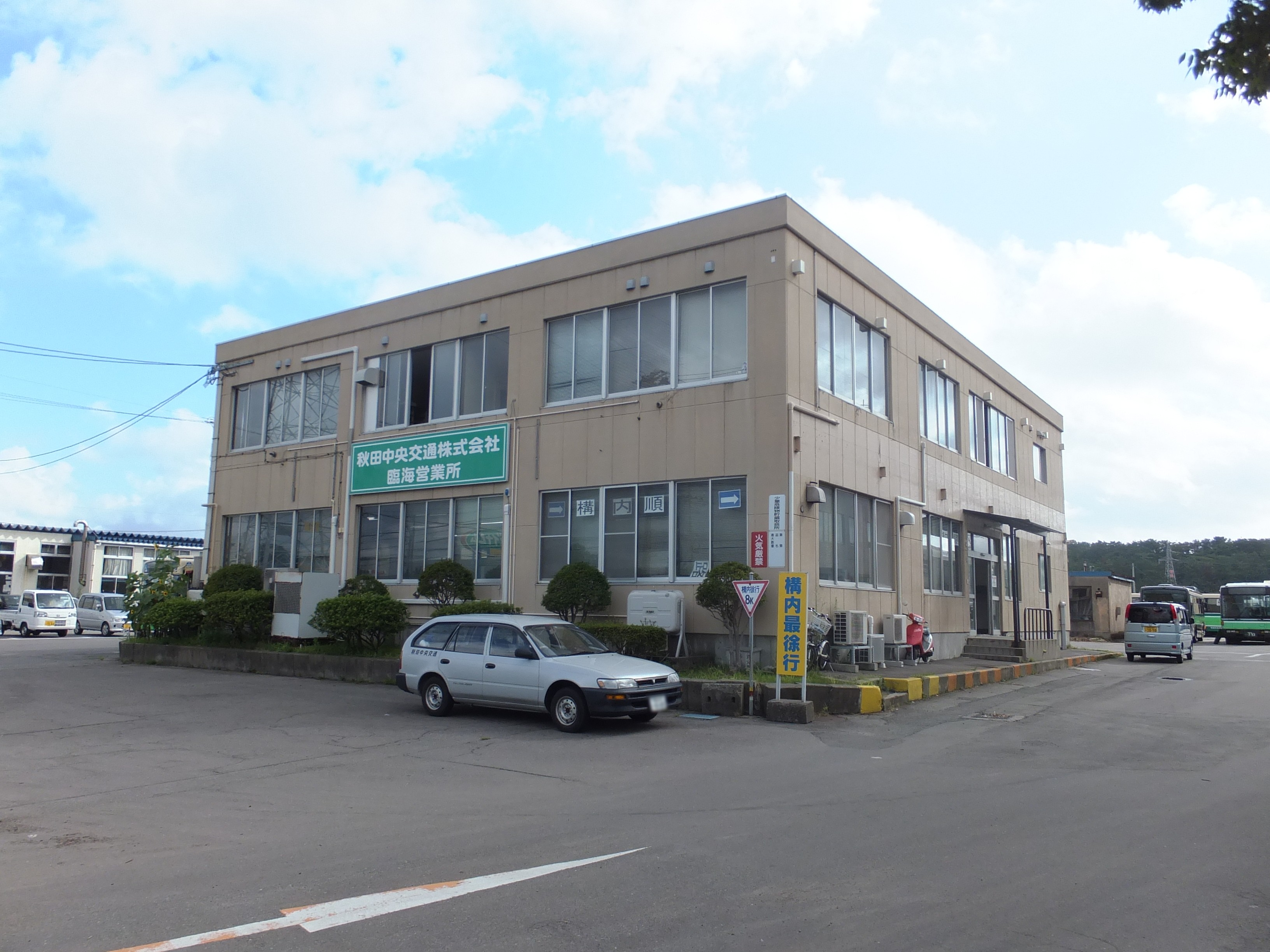 秋田中央交通臨海営業所（秋田市寺内蛭根）